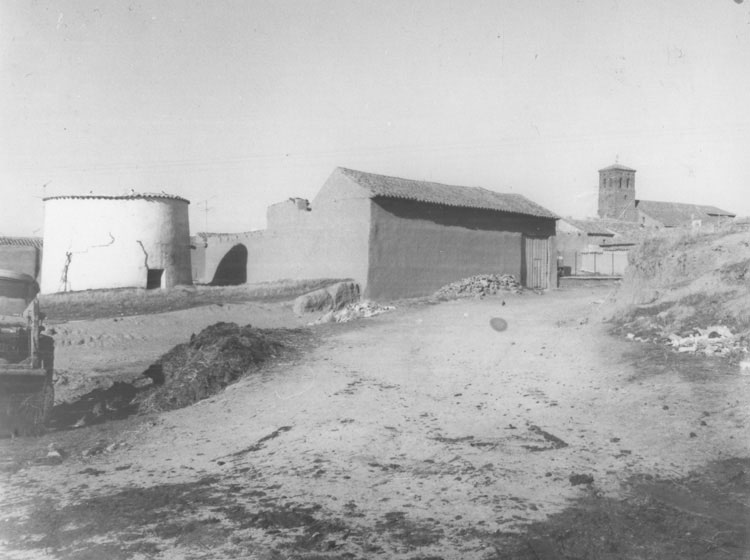 Vistas - Ceinos de Campos (Valladolid) - Álbum 200 x 140 - Fotografía. Papel 120 x 90 B/N